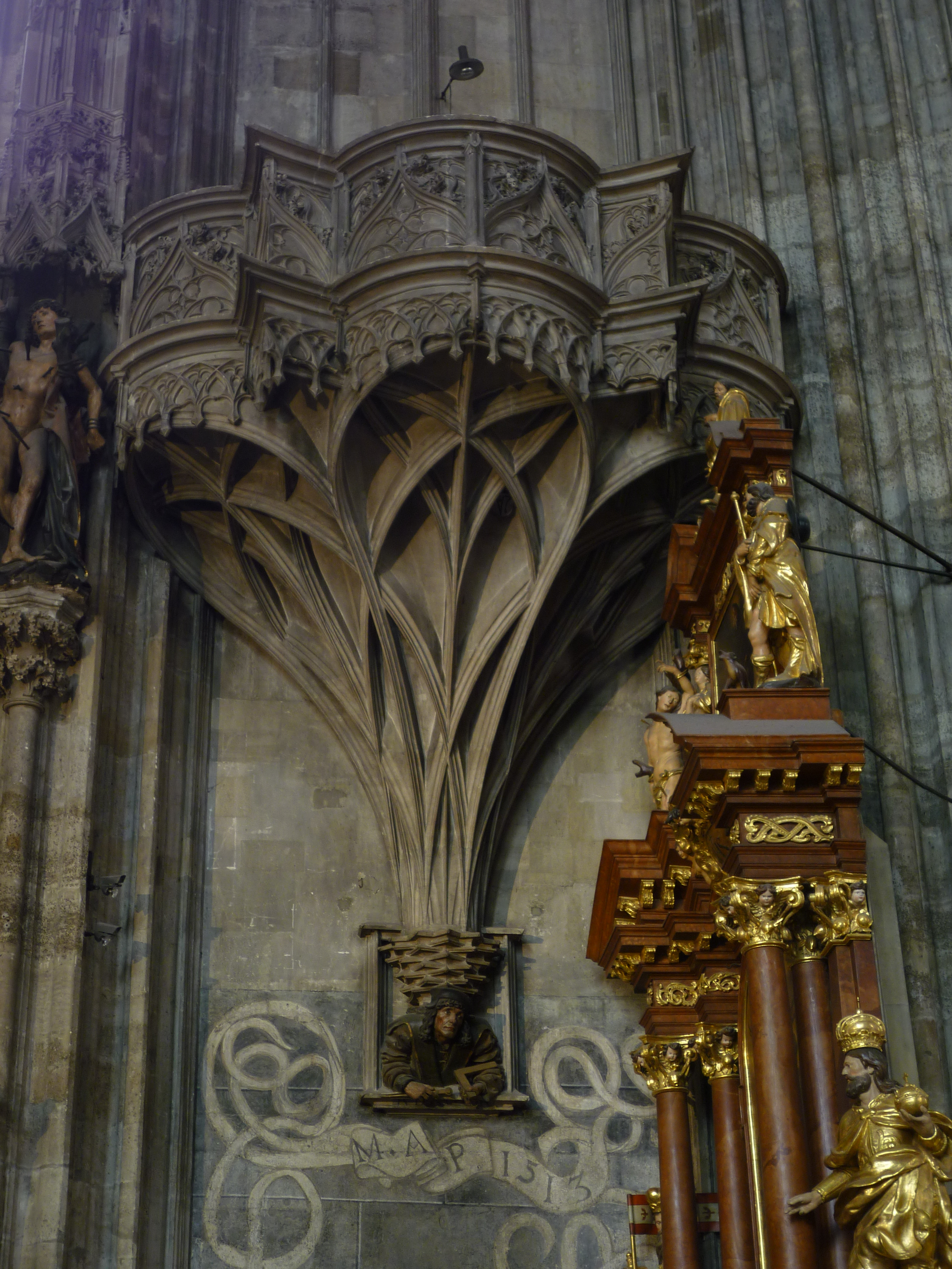 Orgelfuß von Meister Anton Pilgram im Wiener Stephansdom